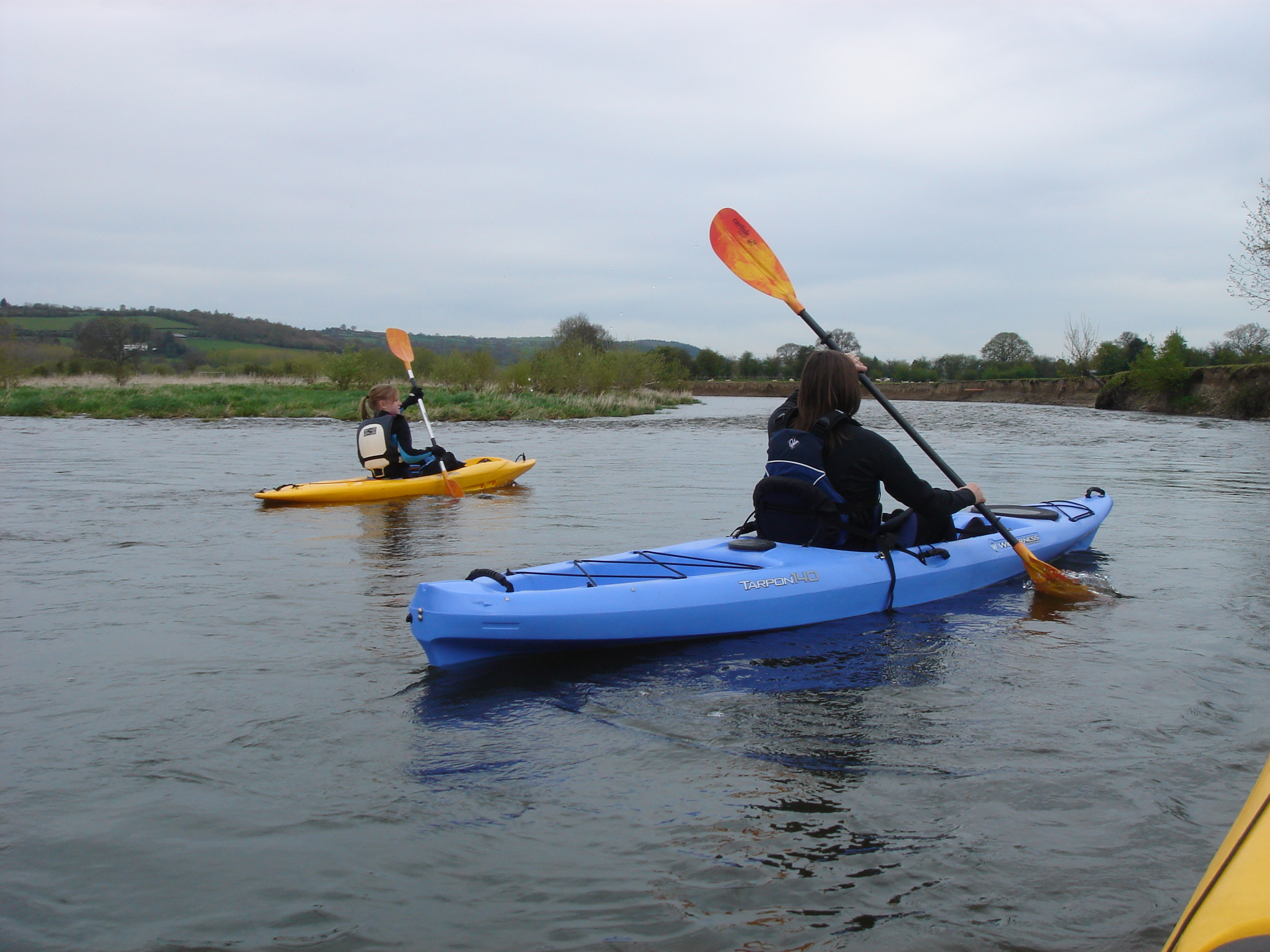 River Wye Kayaking